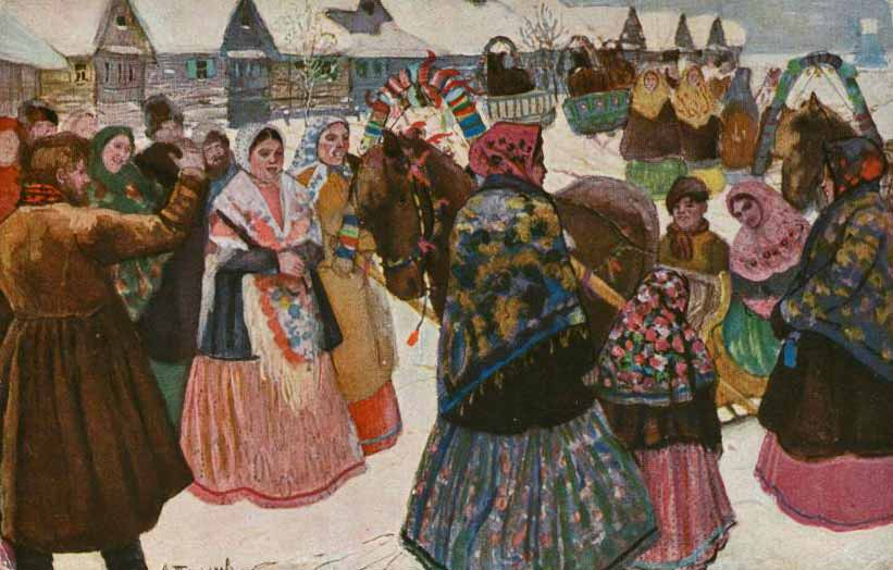 В деревне. Алексей Николаевич Третьяков 1867(?) г.